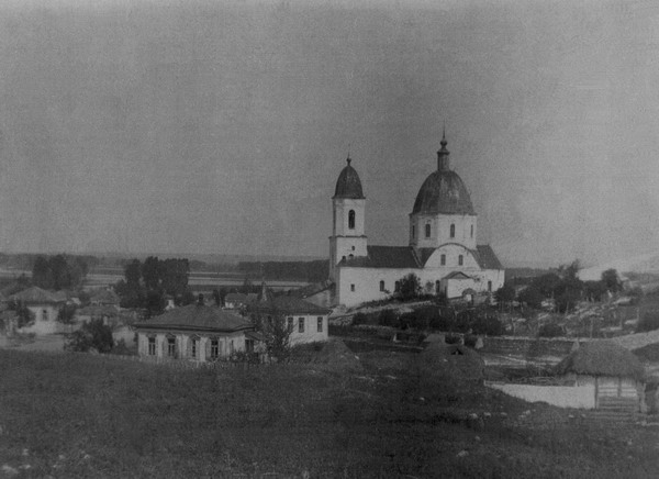 Область Войска Донского, Хопёрский округ, станица Усть-Бузулуцкая, Христорождественская церковь.